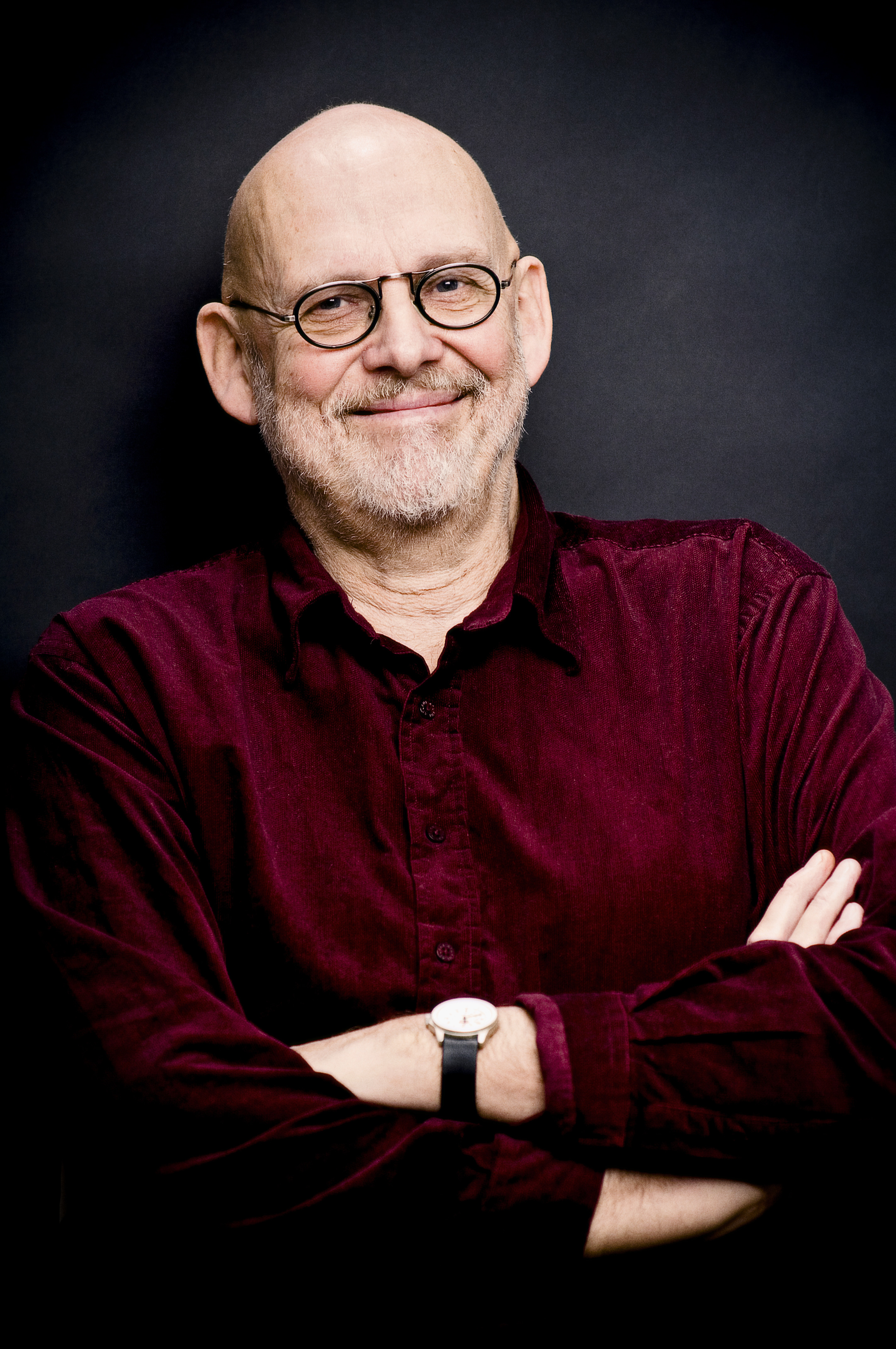 Författaren och tecknaren Jan Lööf.